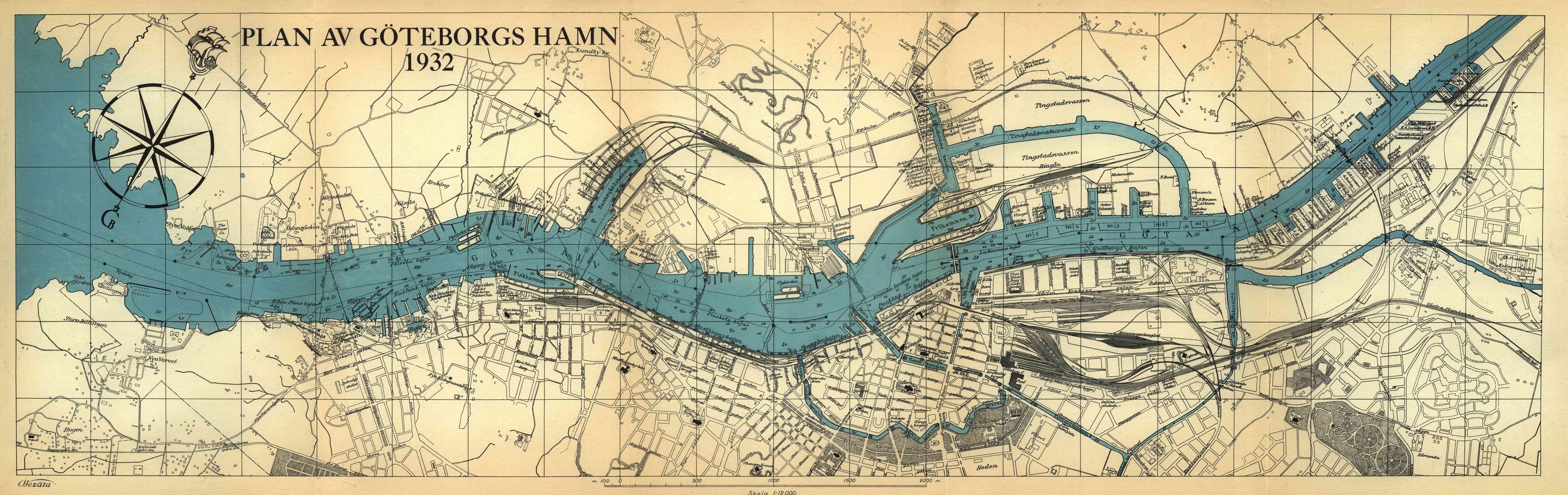 Port of Gothenburg map = Göteborgs hamn 1932